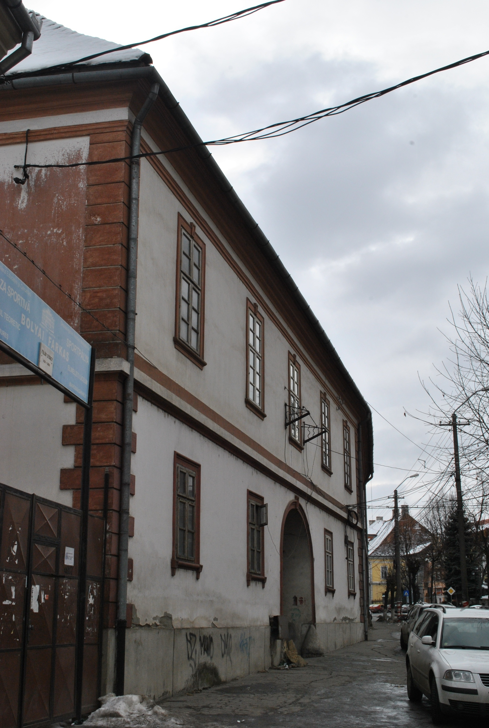 Prefectura veche a judeţului Mureş.